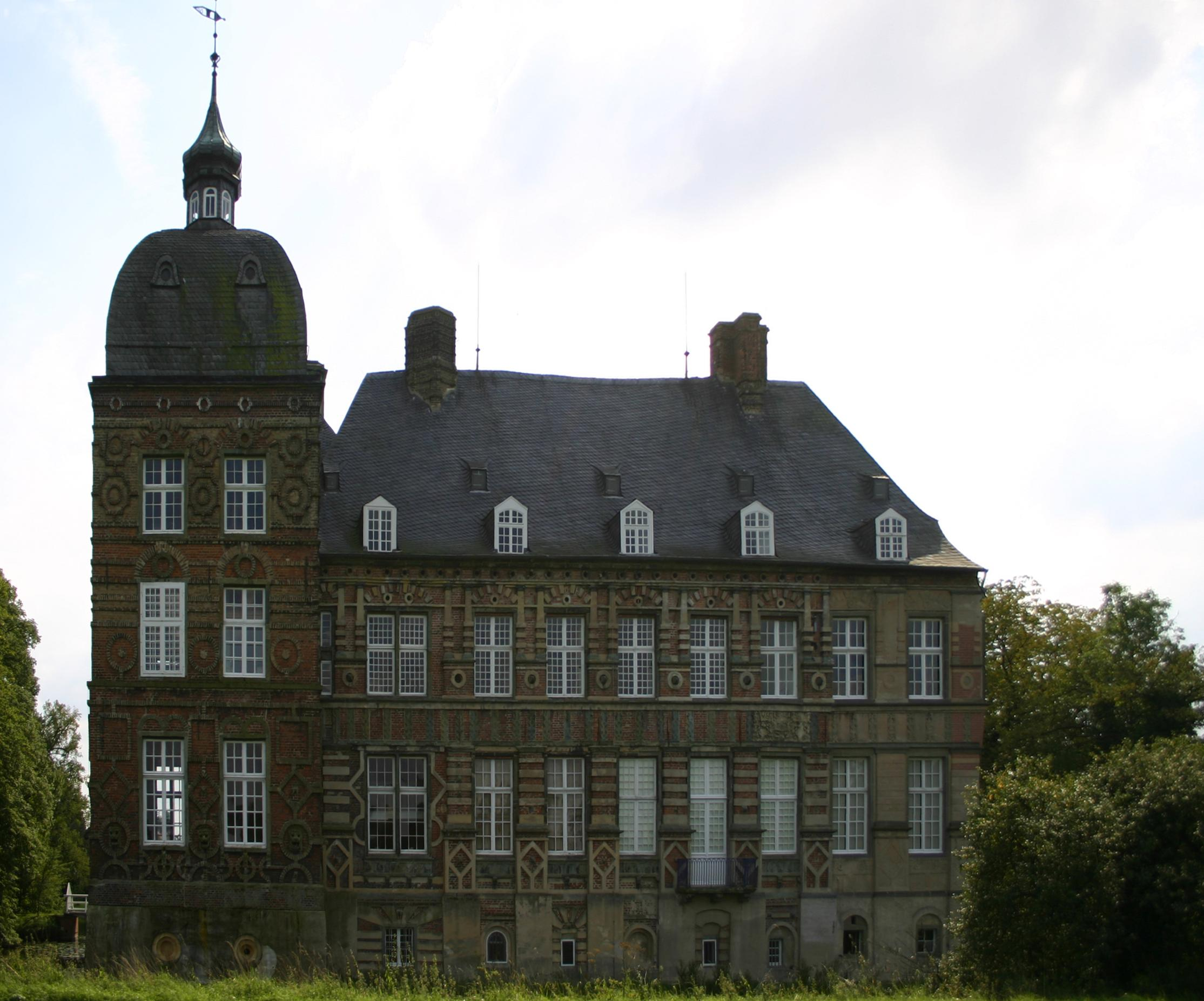 Das Wasserschloss Hovestadt, Lippetal.